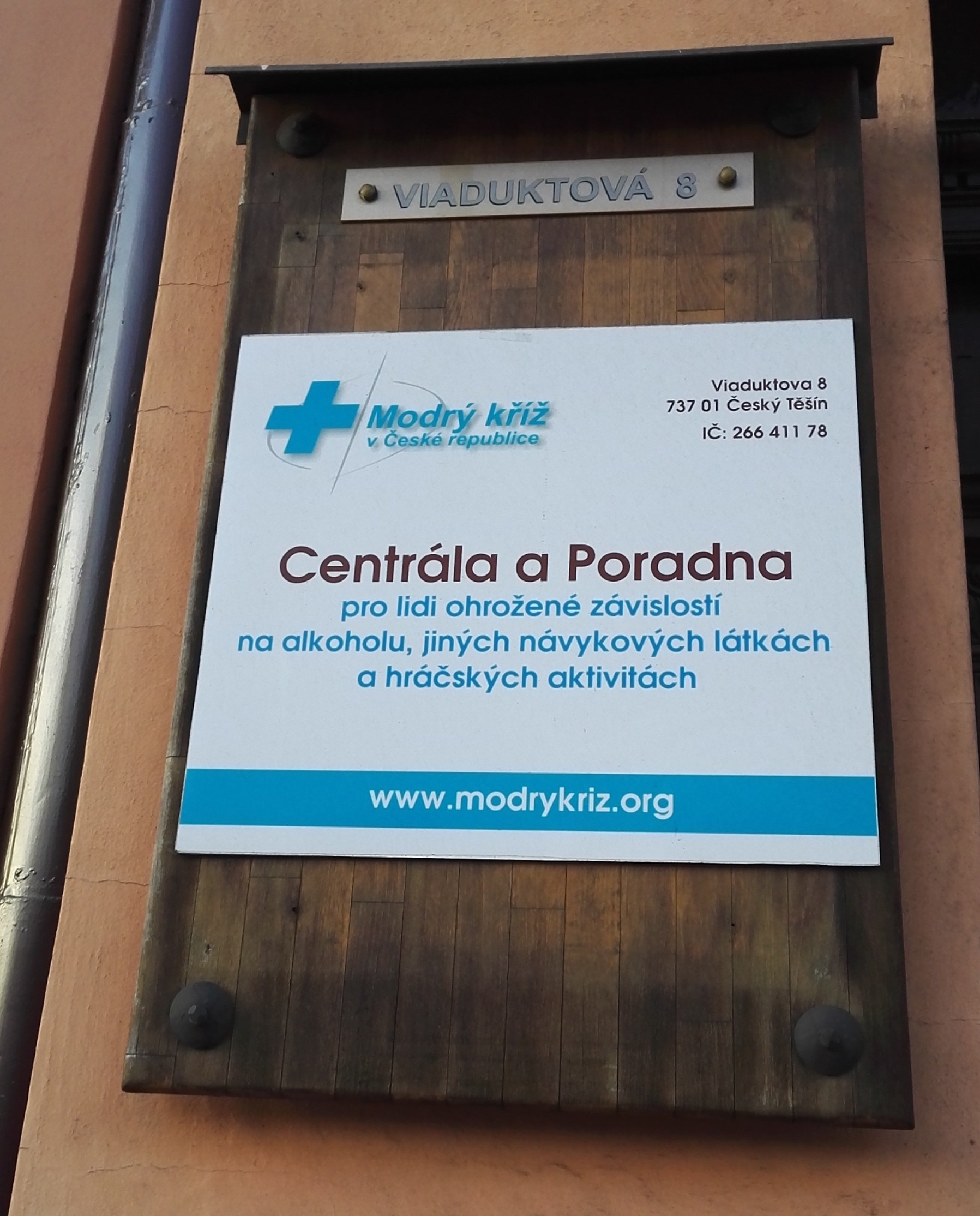 Český Těšín.